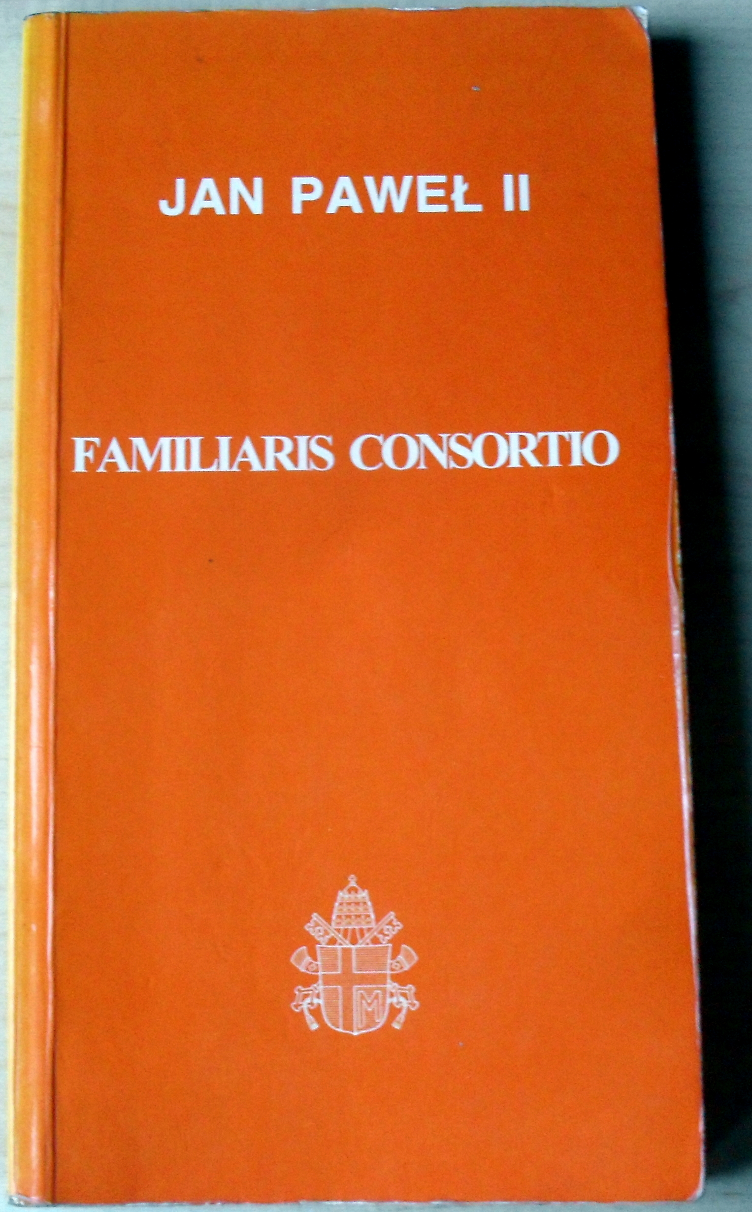 Okładka Familiaris Consortio